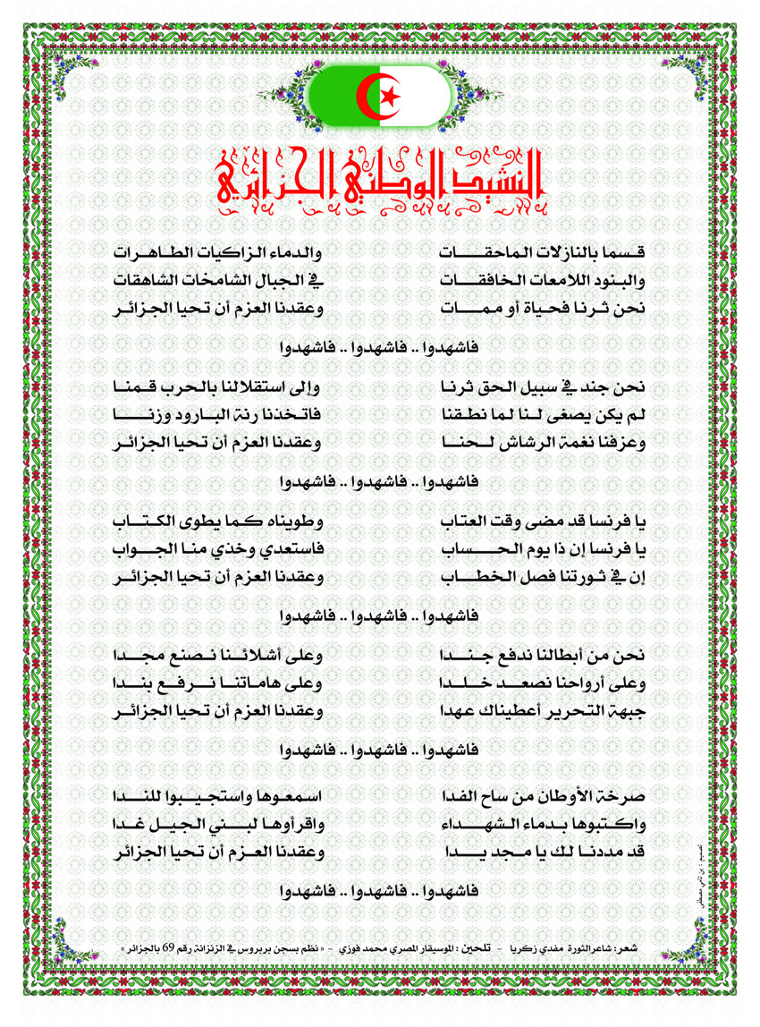 النشيد الوطني الجزائري